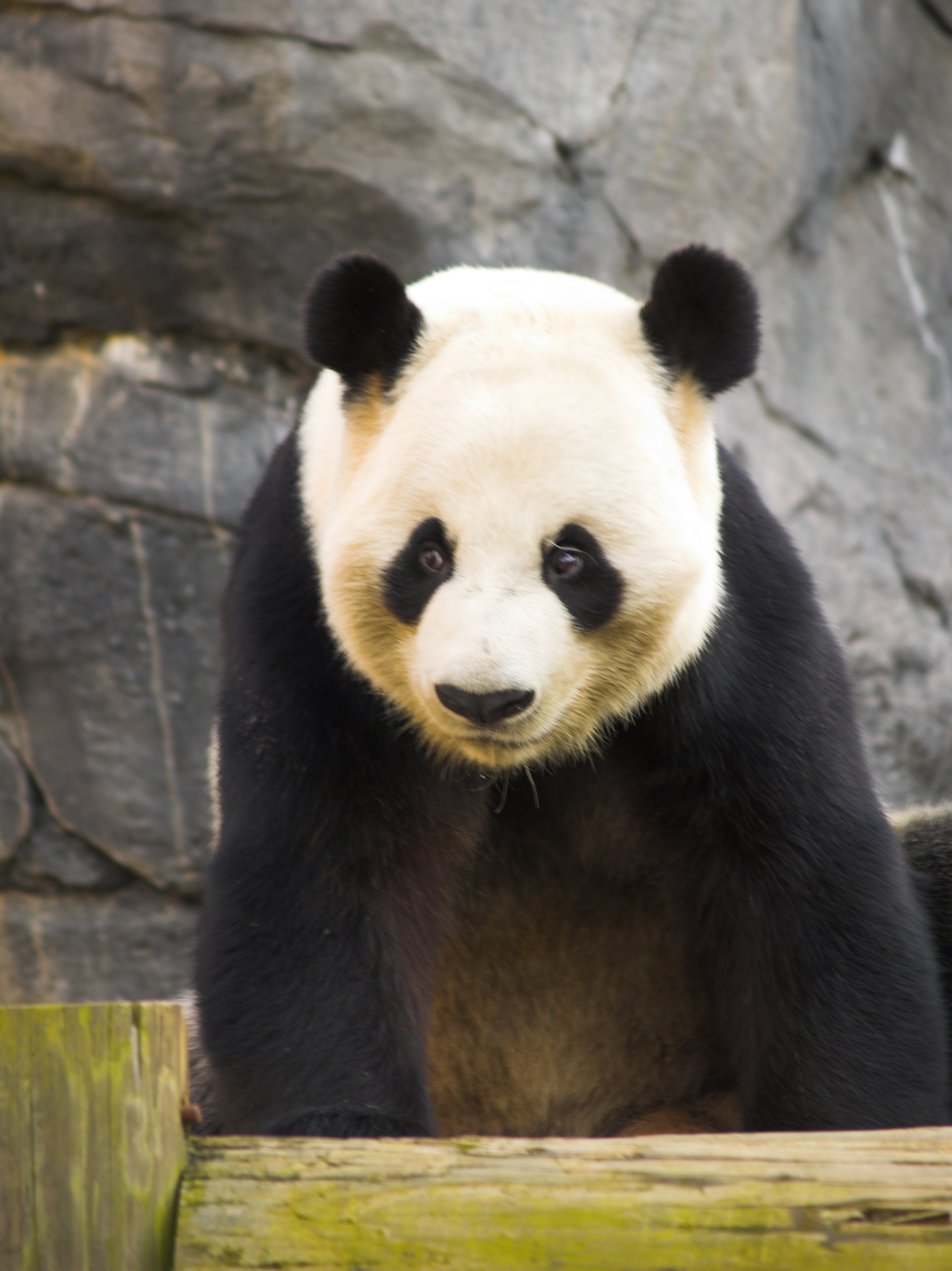 Panda at Zoo Atlanta.